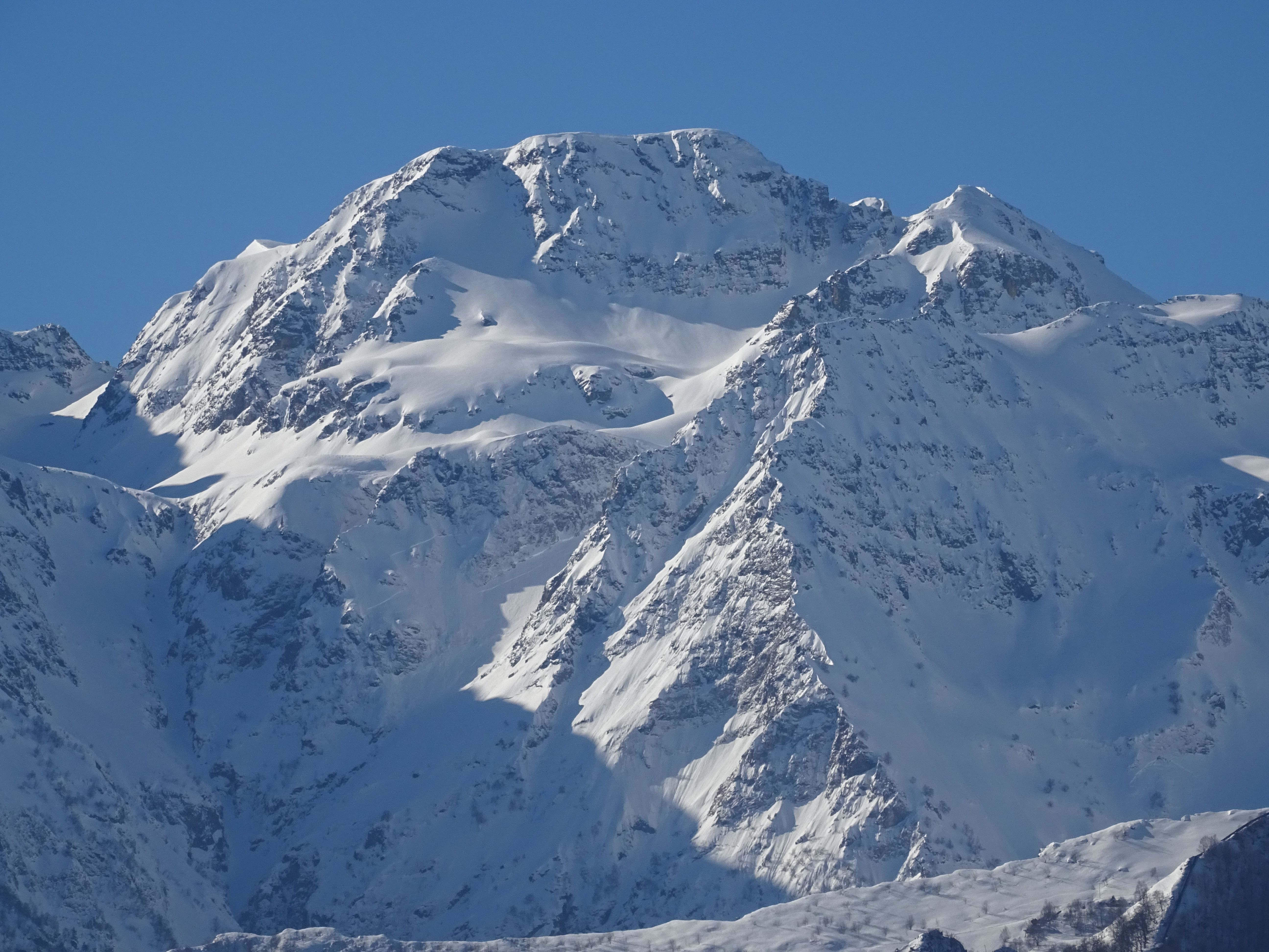 Hivers au Pic de Tartereau